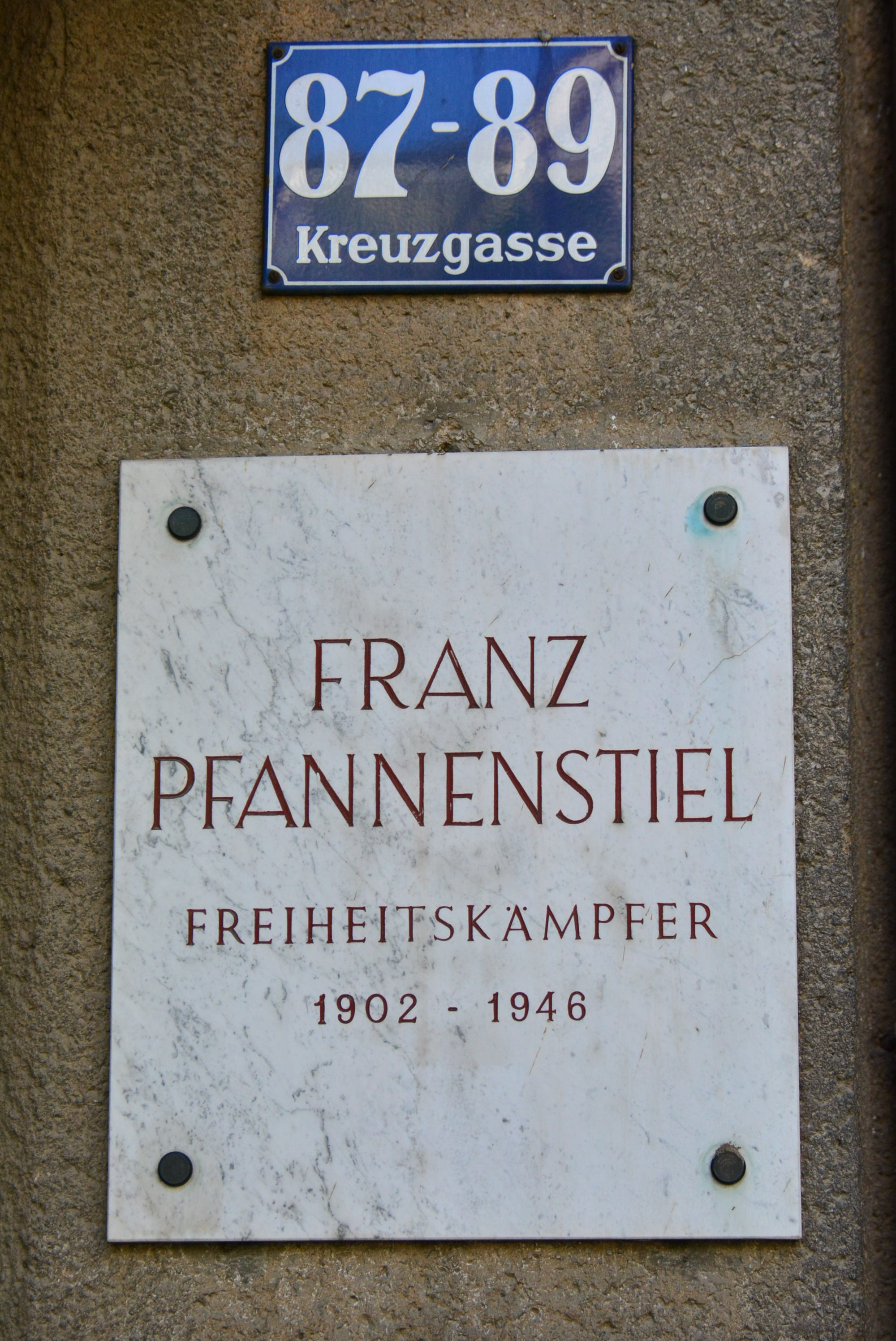 Gedenktafel für Franz Pfannenstiel (Wien, Kreuzgasse 87 - 89)